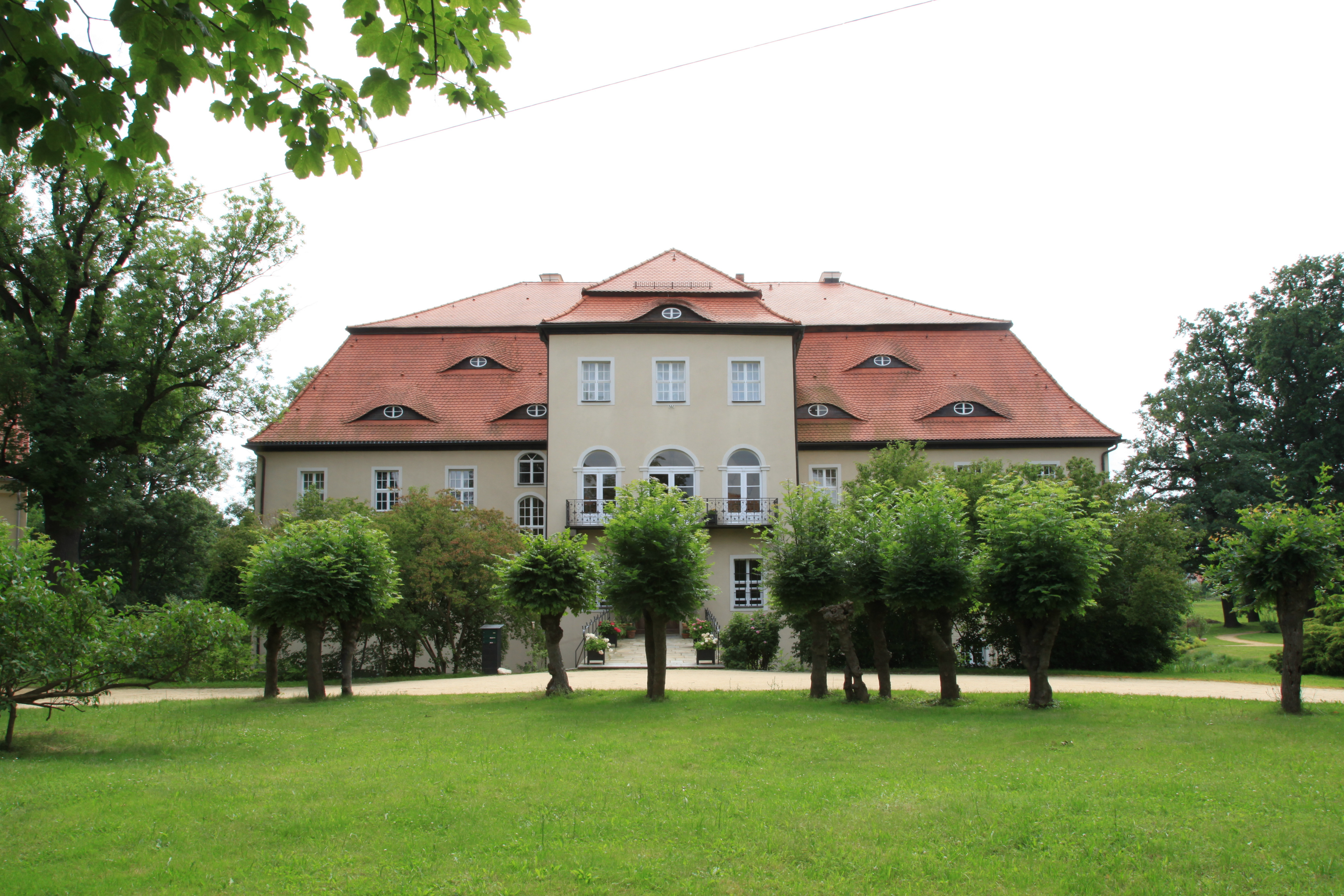 Schloßplatz und Schloss, Wurschen in Weißenberg